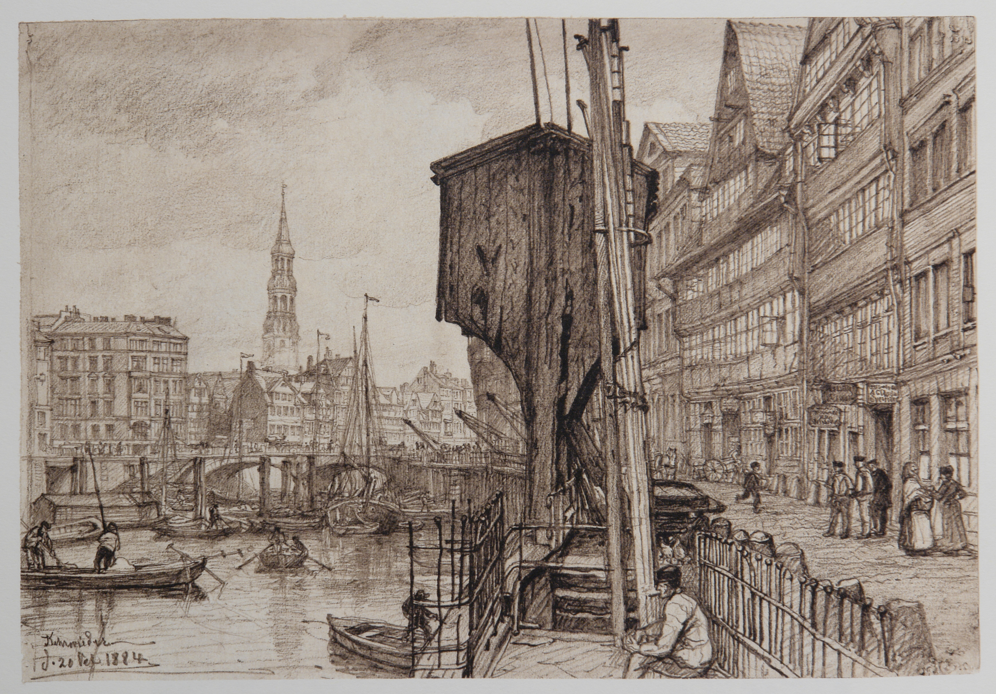 HAMBURG. Augenblicke einer Stadt 1882-1894. In 50 Zeichnungen von Johann Theobald Riefesell nach Originalen im Museum für Hamburgische Geschichte. Kehrwieder-6-12 20-10-1884